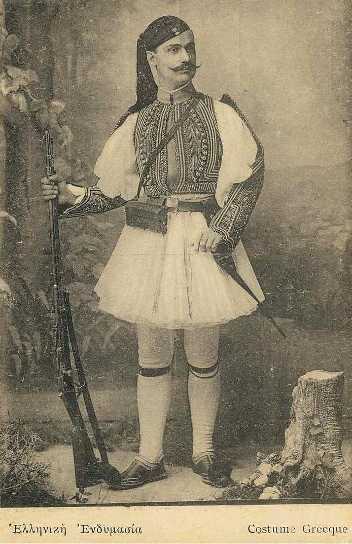 Costume Grec.